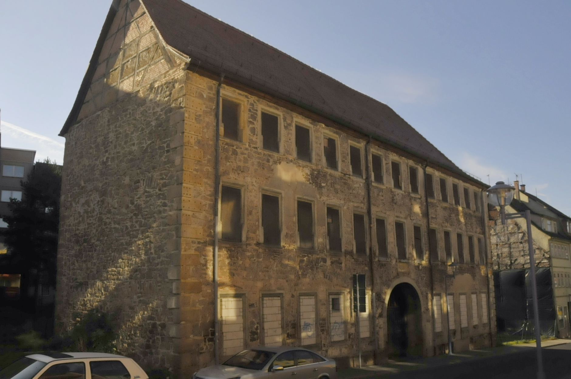 Gotha, Augustinerstraße 15 (Amtshaus, leerstehend)